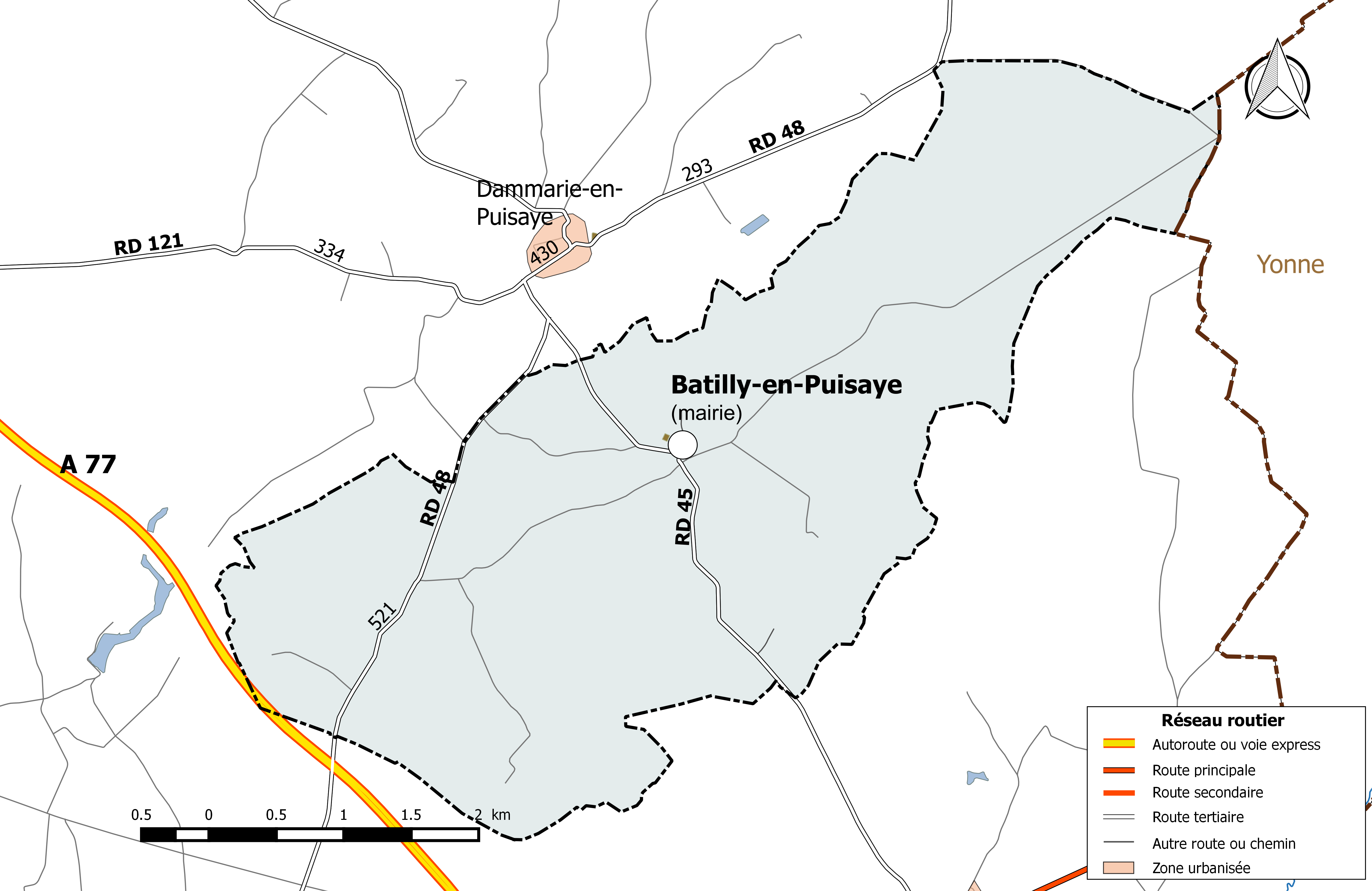 Carte du réseau routier de la commune de Batilly-en-Puisaye.